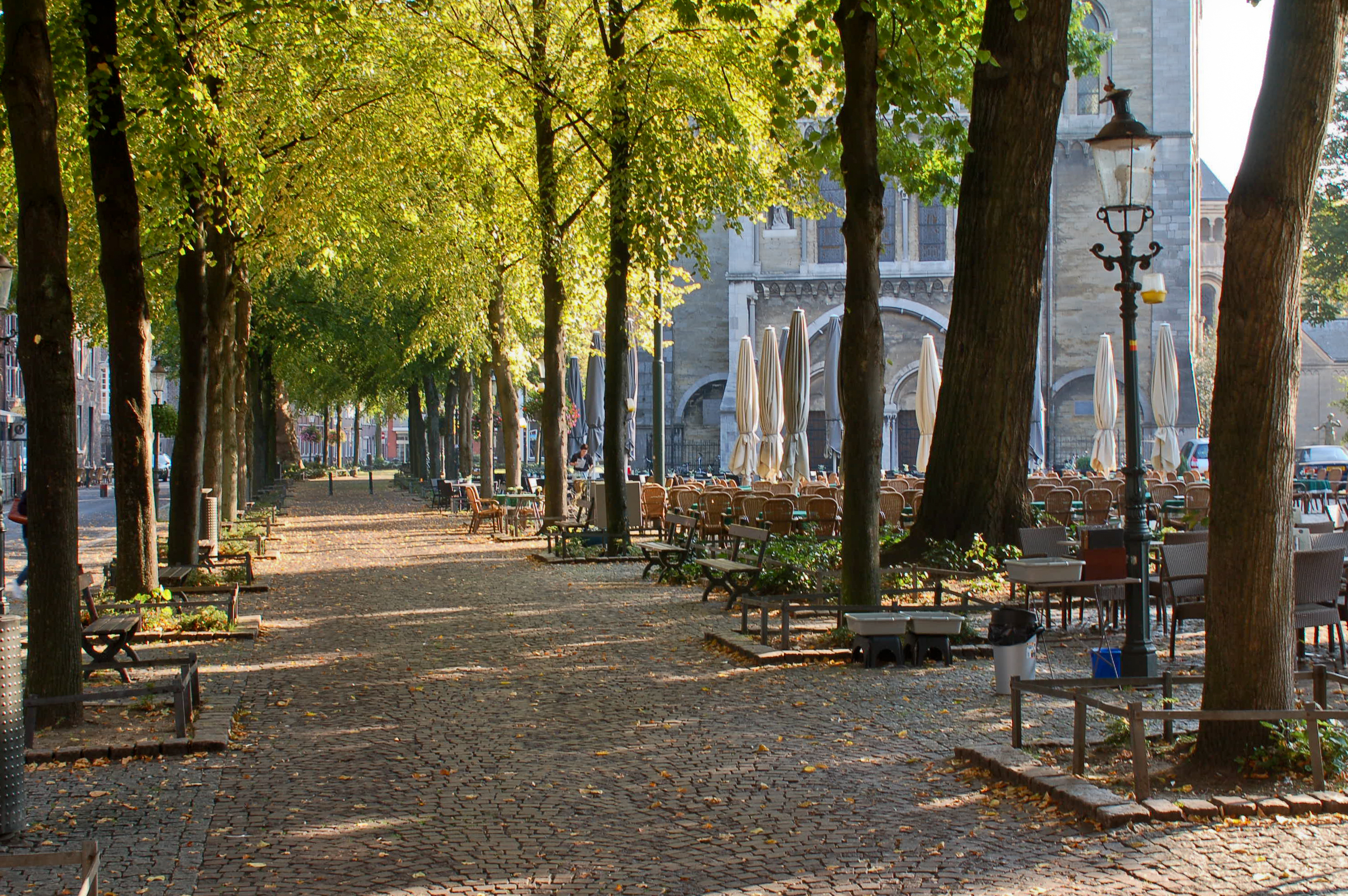 Platz an der Munsterkerk in Roermond, Niederlande